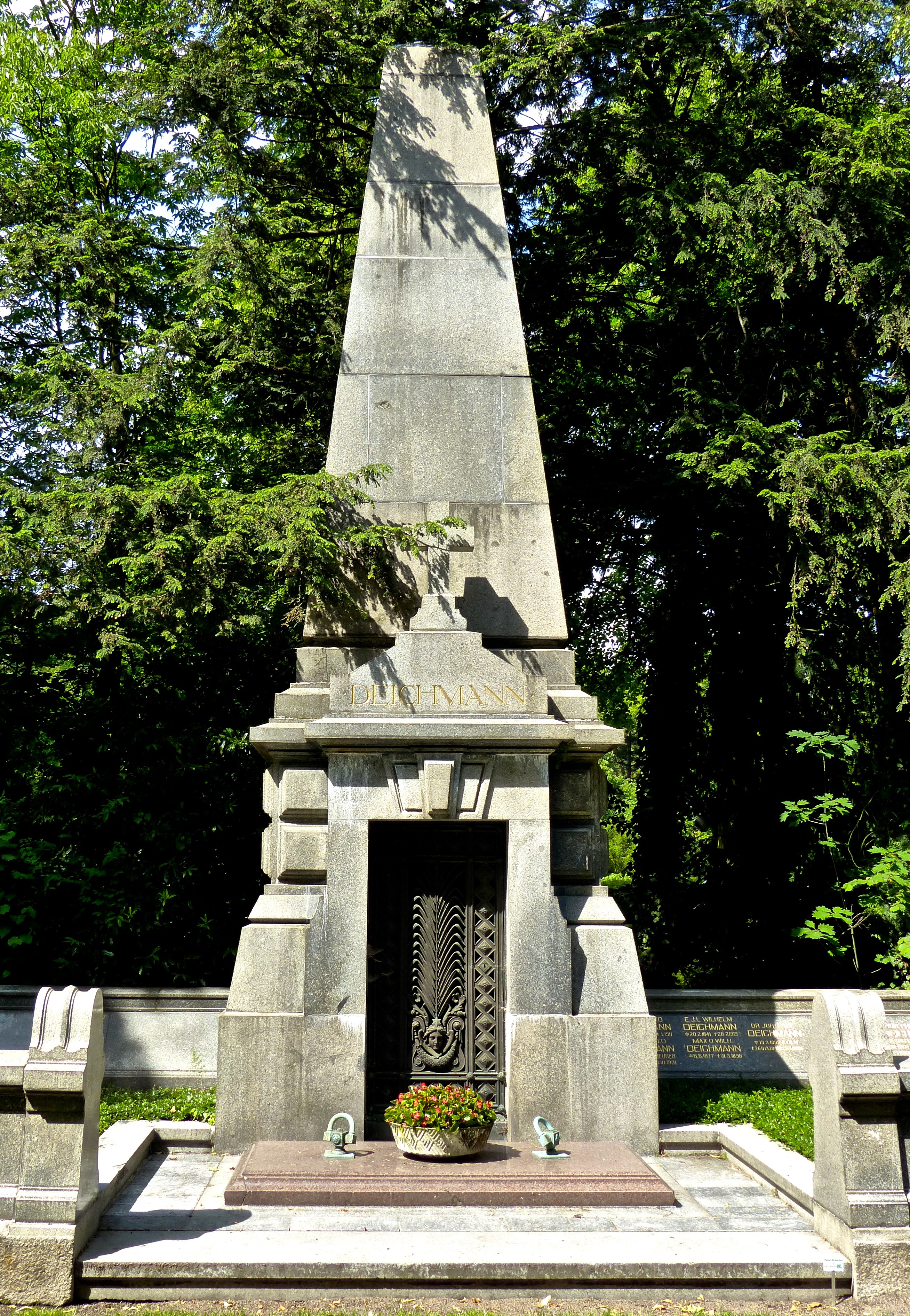 Friedhof Melaten: Grabstelle Deichmann, Millionenallee (Architekt Hermann Otto Pflaume und Heinrich Band, Metallgitter: Wilhelm Albermann)